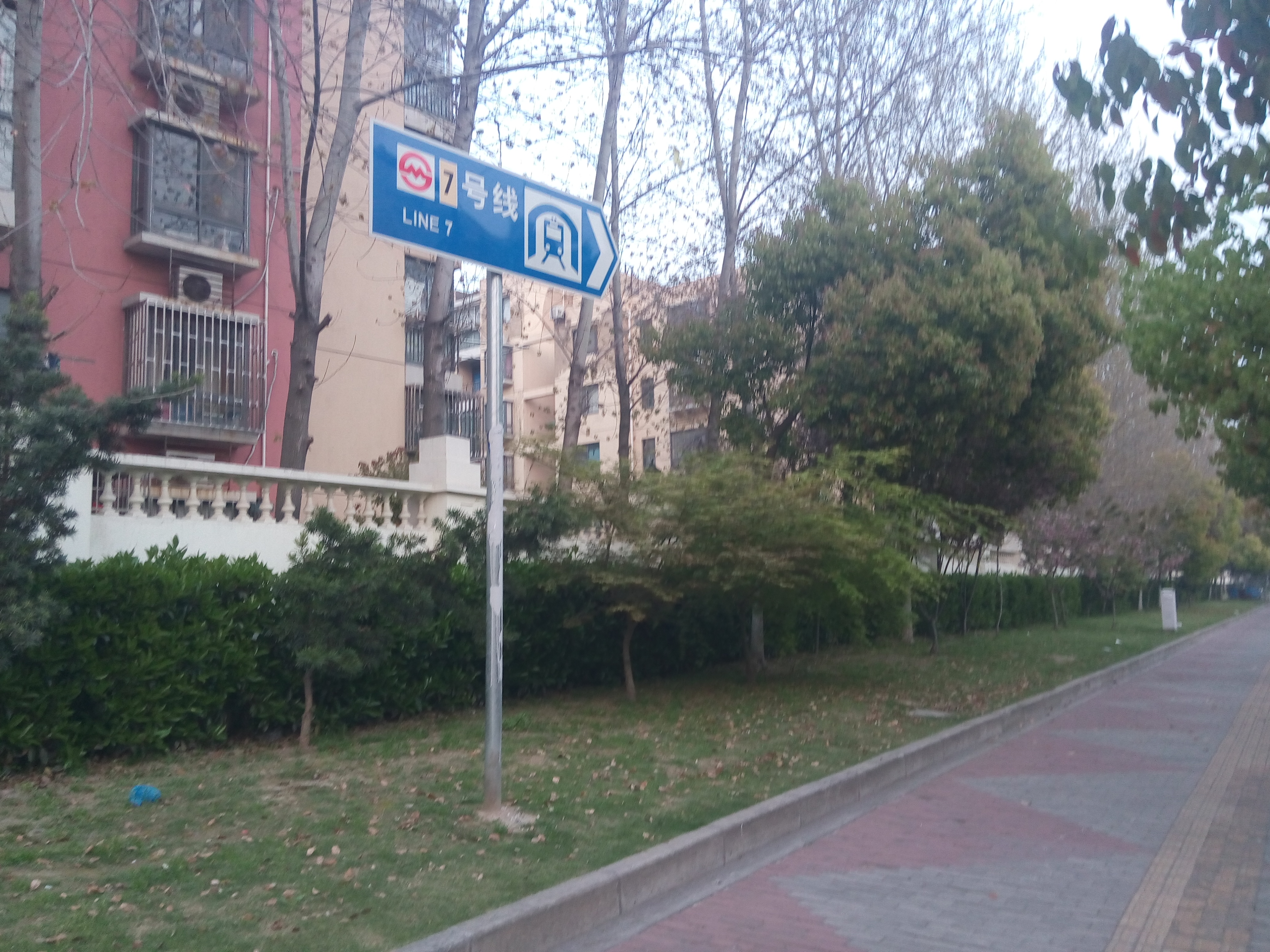 7号线顾村公园站附近的指示牌